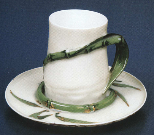 Tasse du président USA Rutherford Hayes conçue par Haviland porcelaine de limoges